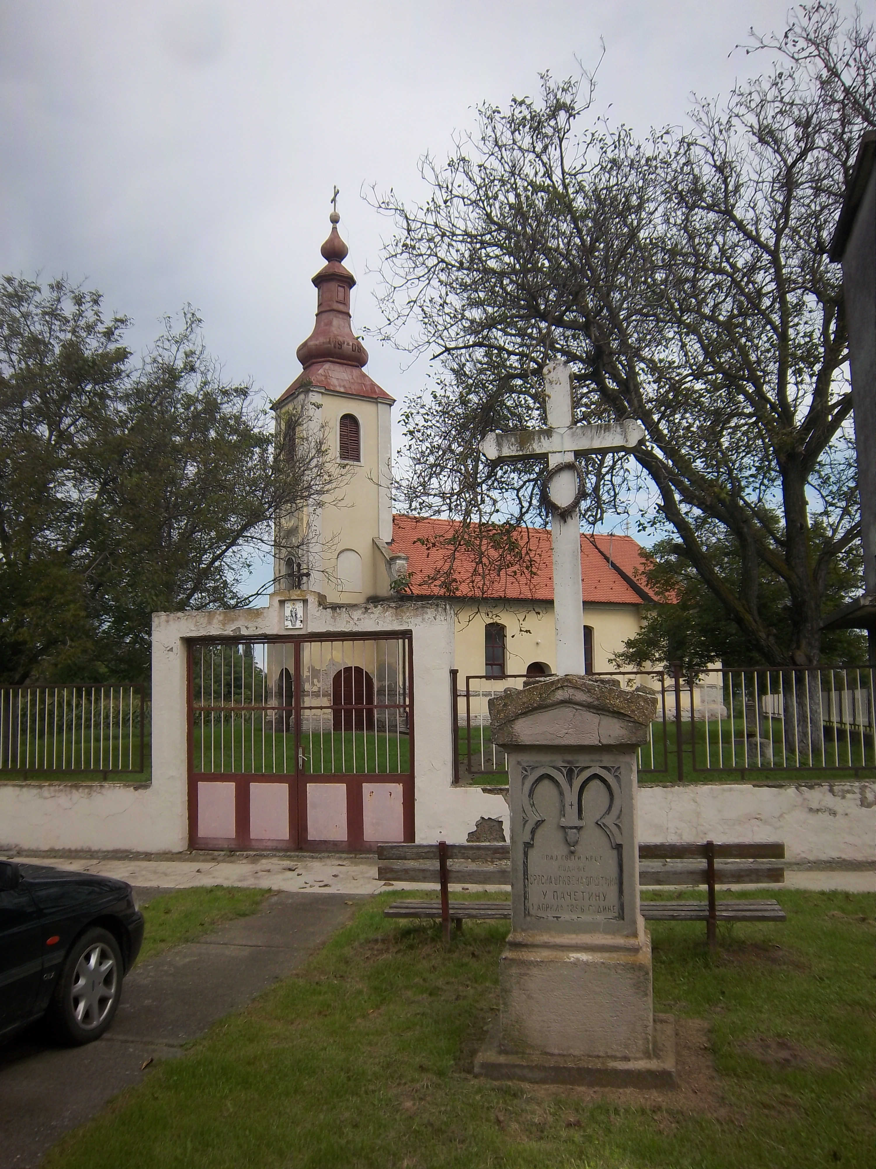 Српски (ћирилица): Насеље Пачетин у Општини Трпиња у источној Хрватској.